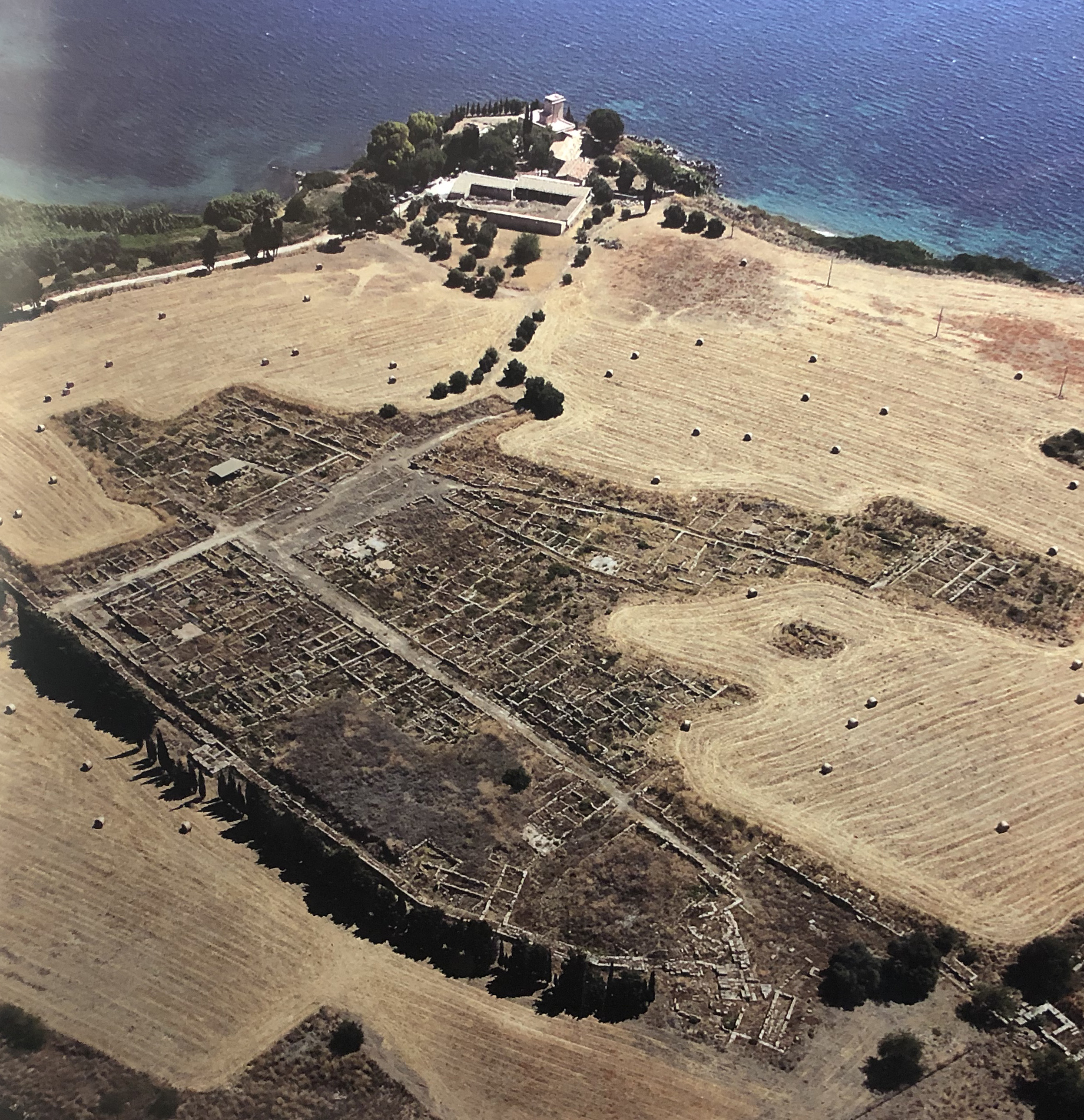 Megara Hyblaea vista dall'alto